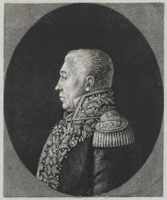 François Louis Dedon-Duclos (1862-1830), général de brigade d'artillerie du Premier Empire.